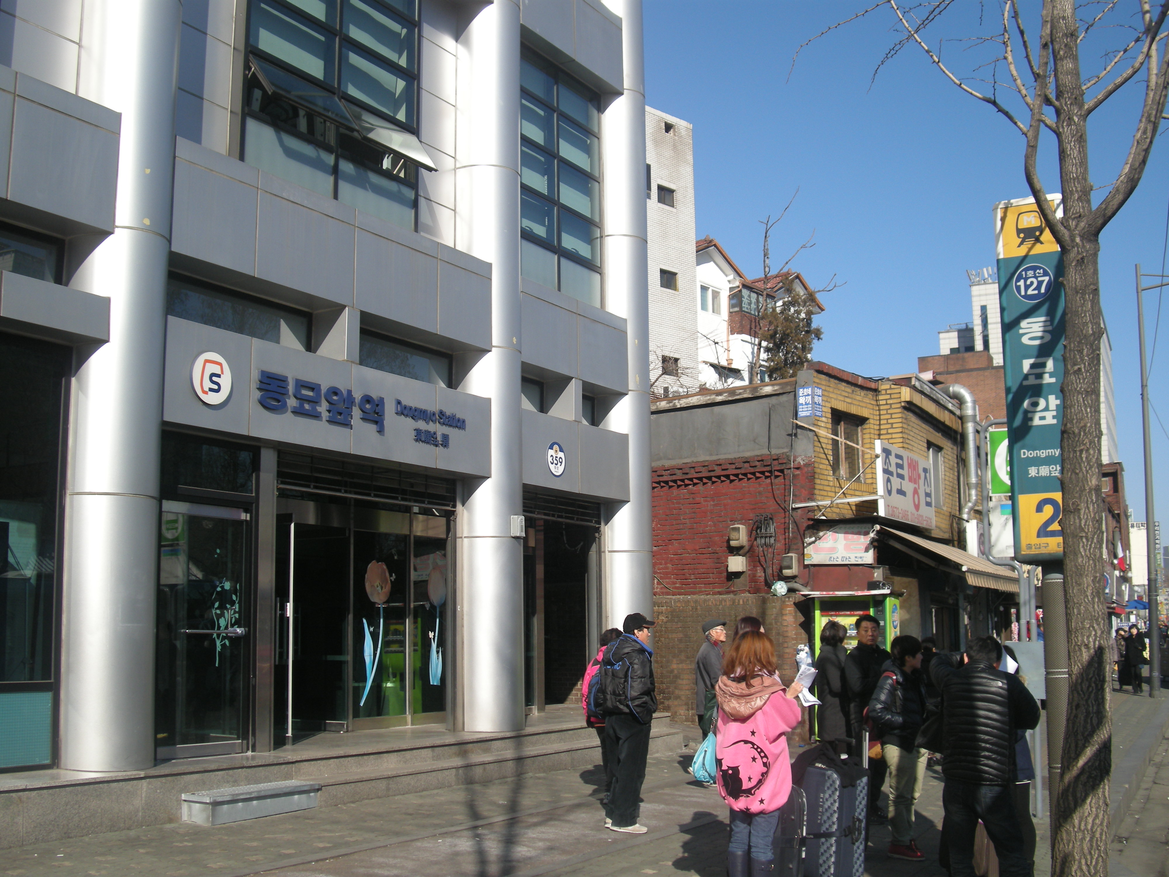 서울 지하철 1호선 동묘앞역 2번 출구